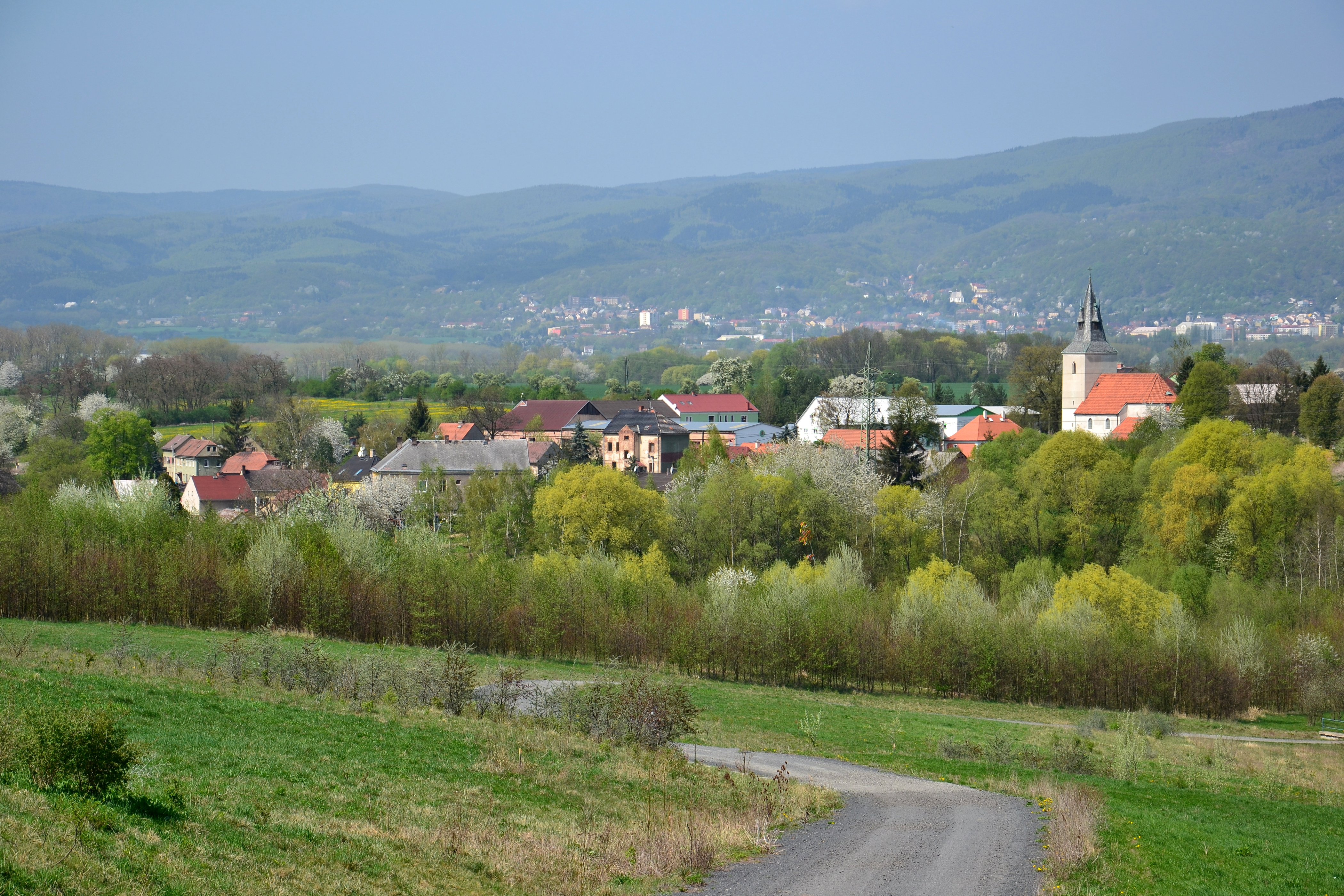 Roudníky – pohled z jihovýchodu